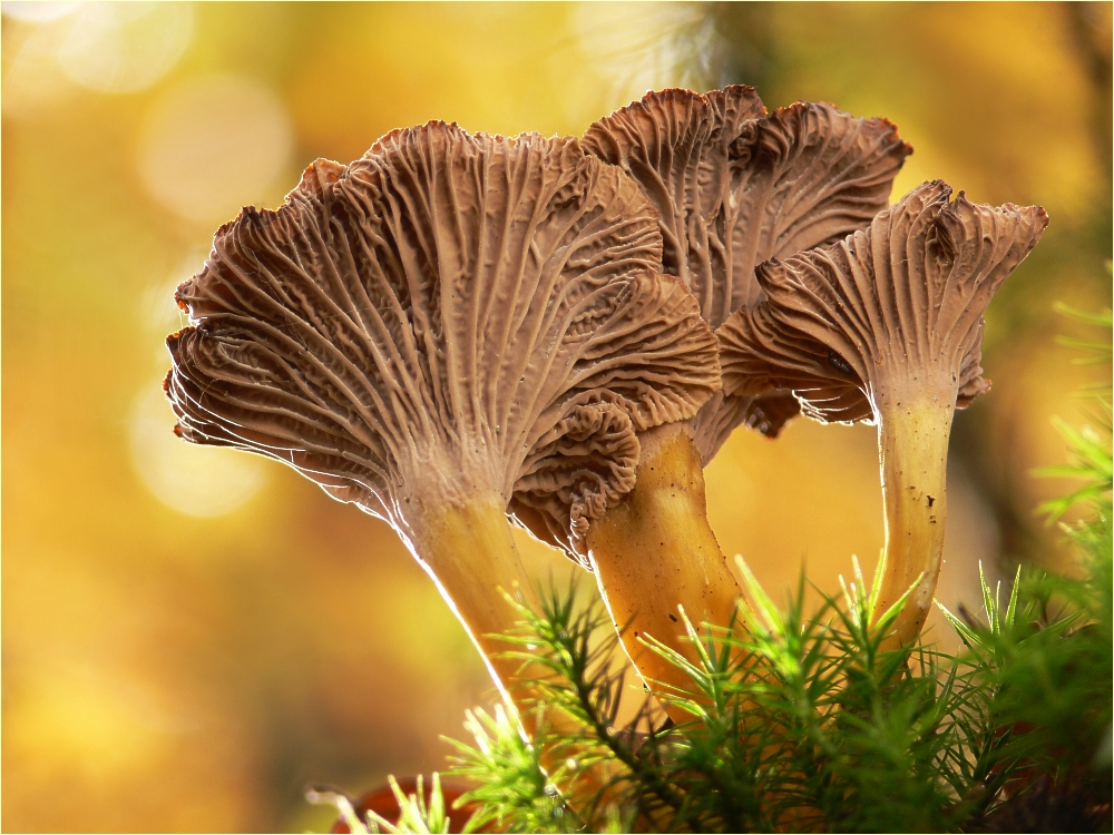 Trompetenpfifferlinge (Cantharellus tubaeformis) in der Nähe der Teufelskanzel bei Burg Hanstein